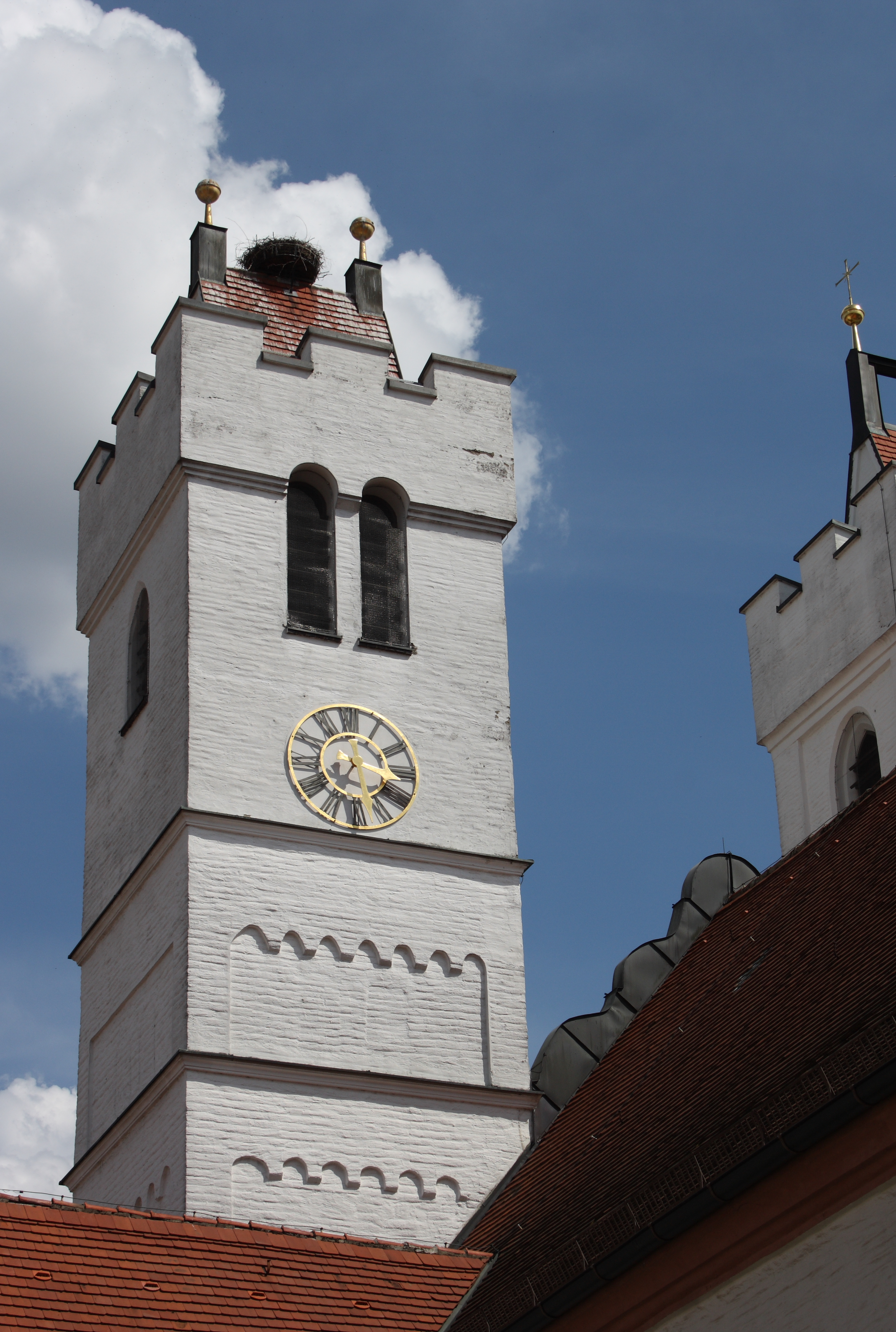 Katholische Pfarrkirche St. Martin in Wertingen im Landkreis Dillingen an der Donau (Bayern), Kirchturm